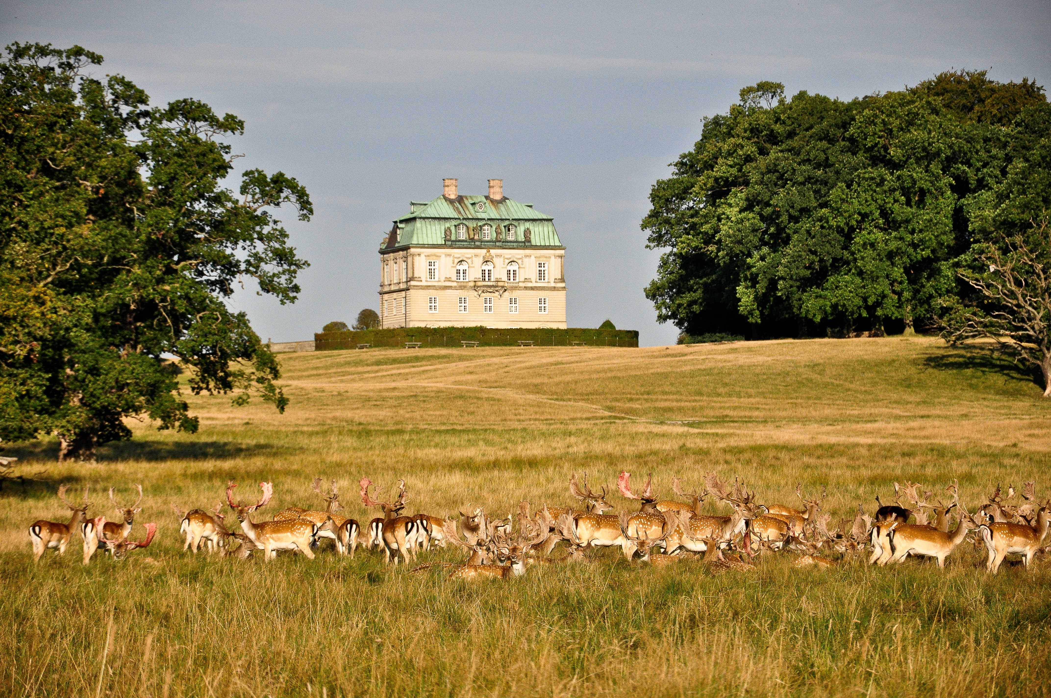 The Hermitage Pavilion in Jægersborg Dyrehave north of Copenhagen, Denmark